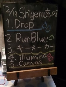 amiinaセトリボード(20150219(1))